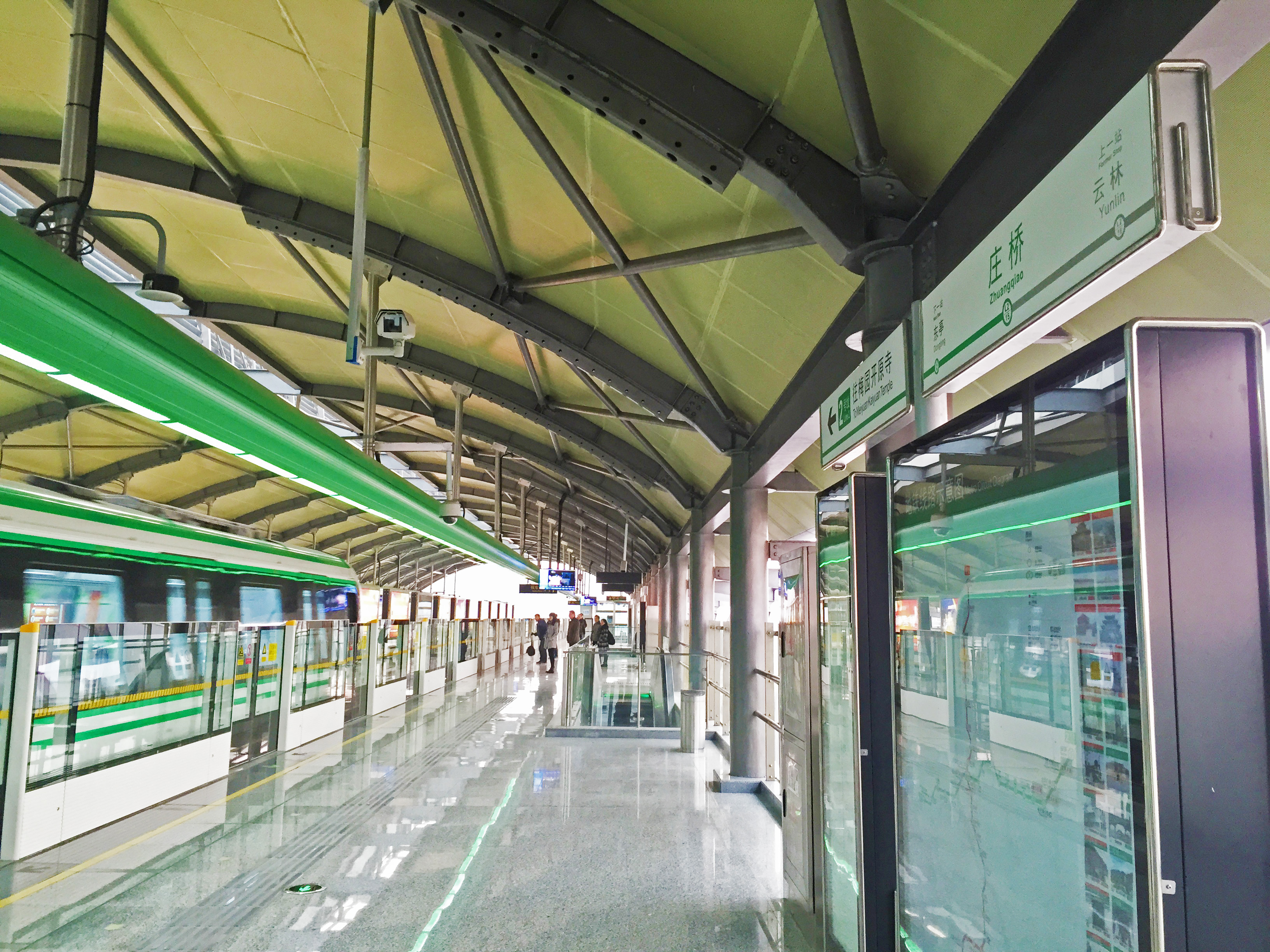 无锡地铁2号线庄桥站站台